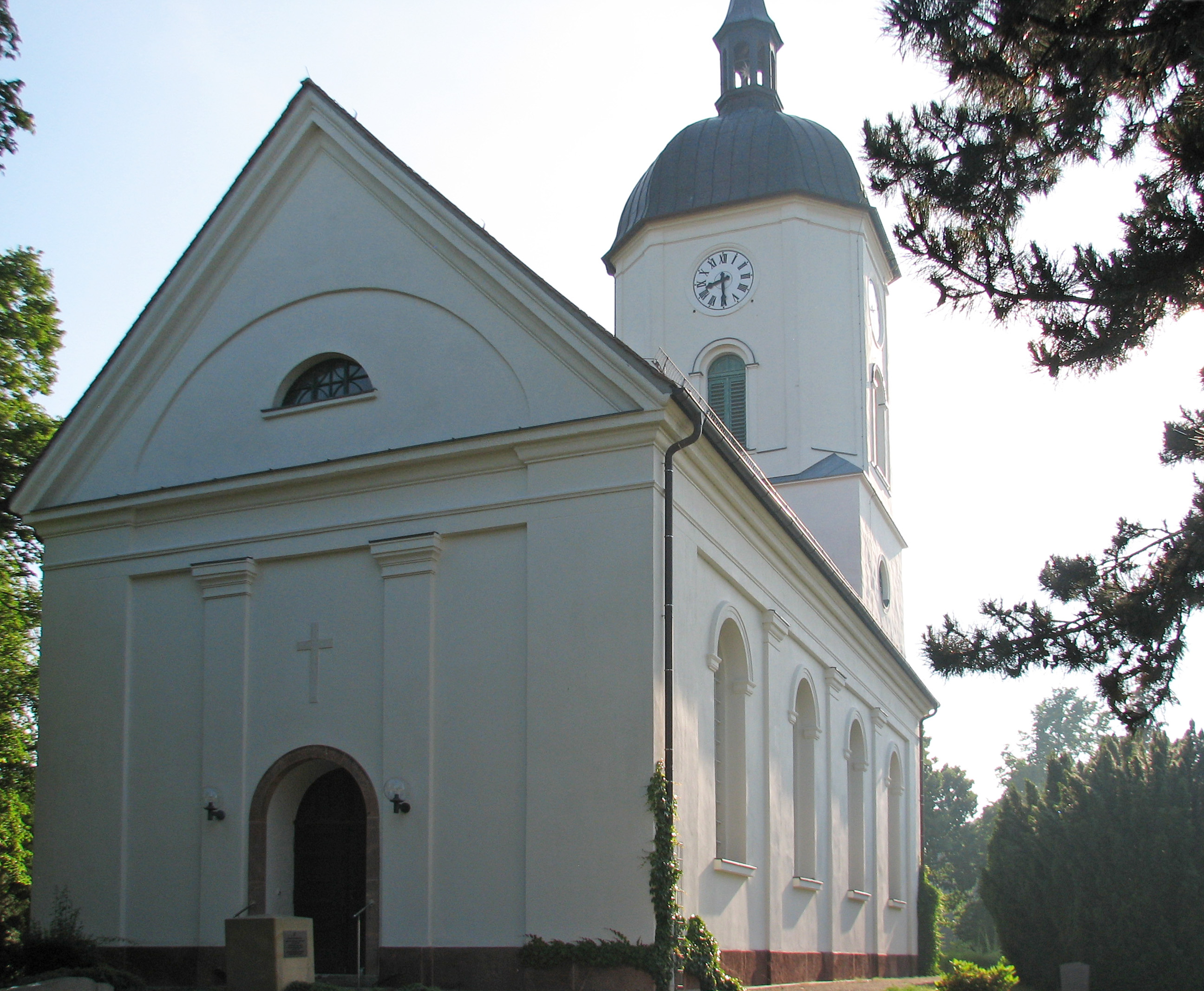 Engelsdorf Kirche Rückseite